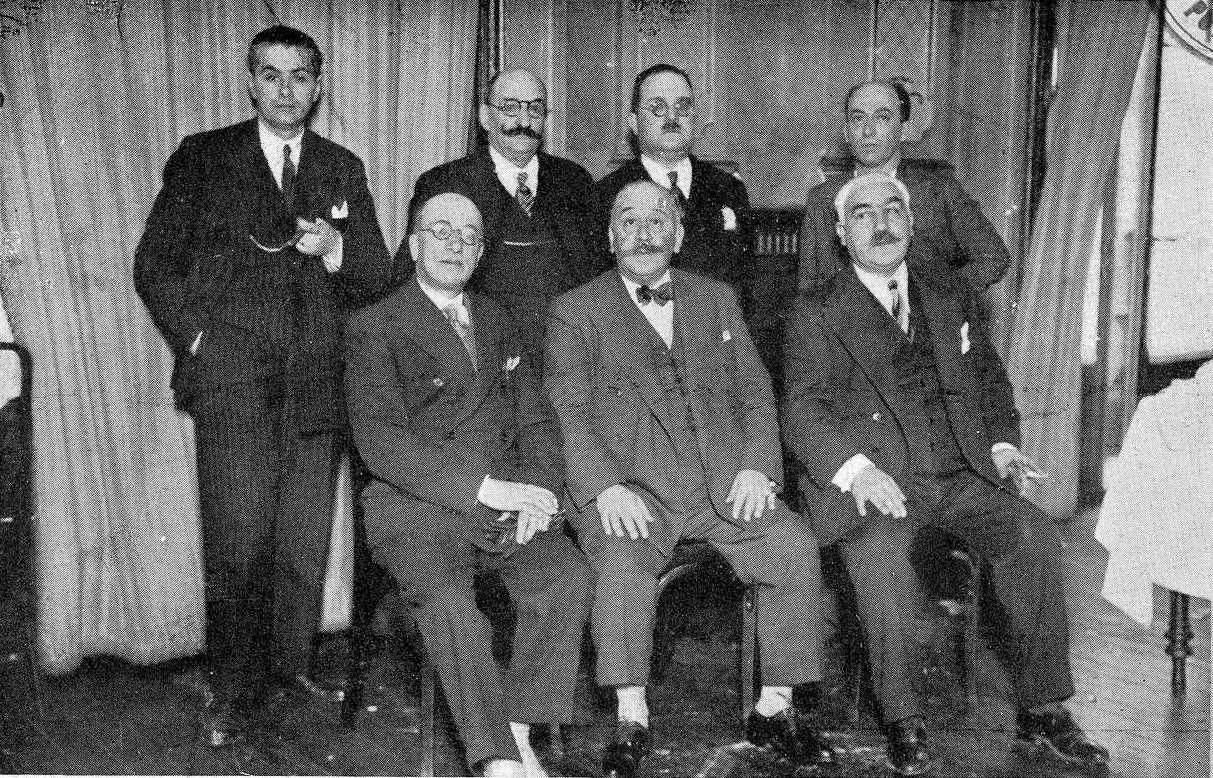 Premio de xornalismo Manuel Otero Bárcena, fotografía en Vida Gallega 1932. De pé, de esquerda a dereita: Apolinar Torres, Avelino Rodríguez Elías, Laureano Domínguez Cao-Cordido e Manuel Lustres Rivas. Sentados: Jaime Solá (xurado), Manuel Otero Bárcena e Blas Agra Mancebo (xurado).